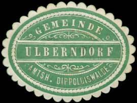 Siegelmarke Gemeinde Ulbendorf